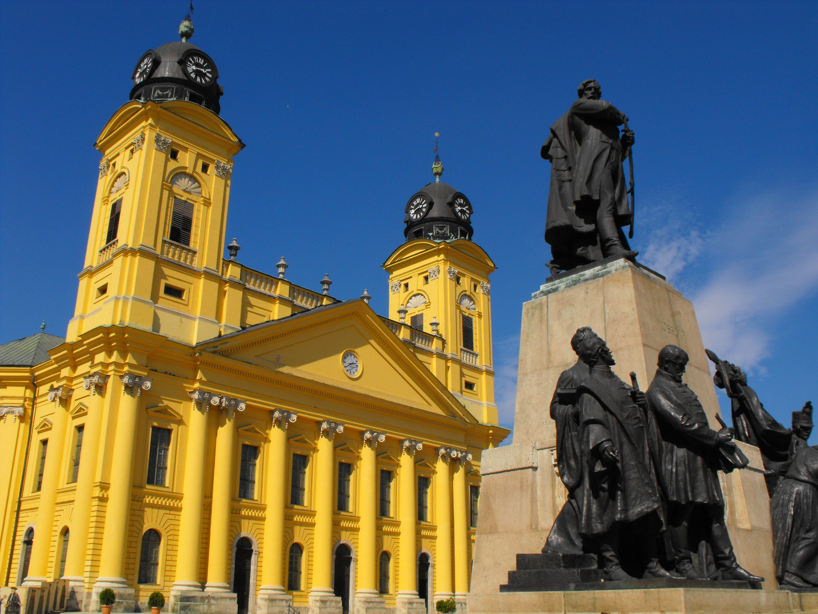 Ref. Nagytemplom (Debrecen, Kálvin tér) This is a photo of a monument in Hungary, Identifier: 5233